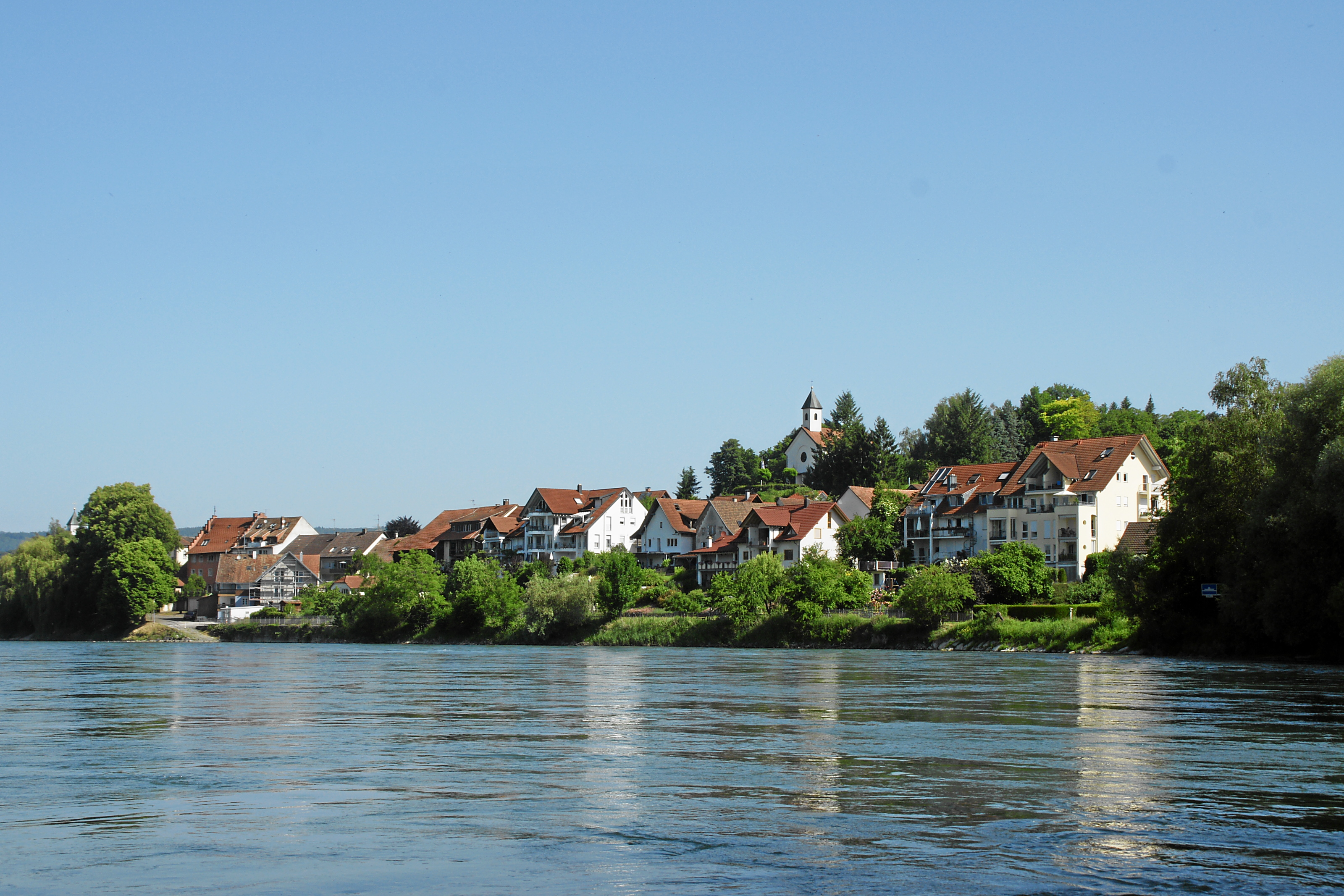 Kadelburg (Gemeinde Küssaberg), links Bootsrampe